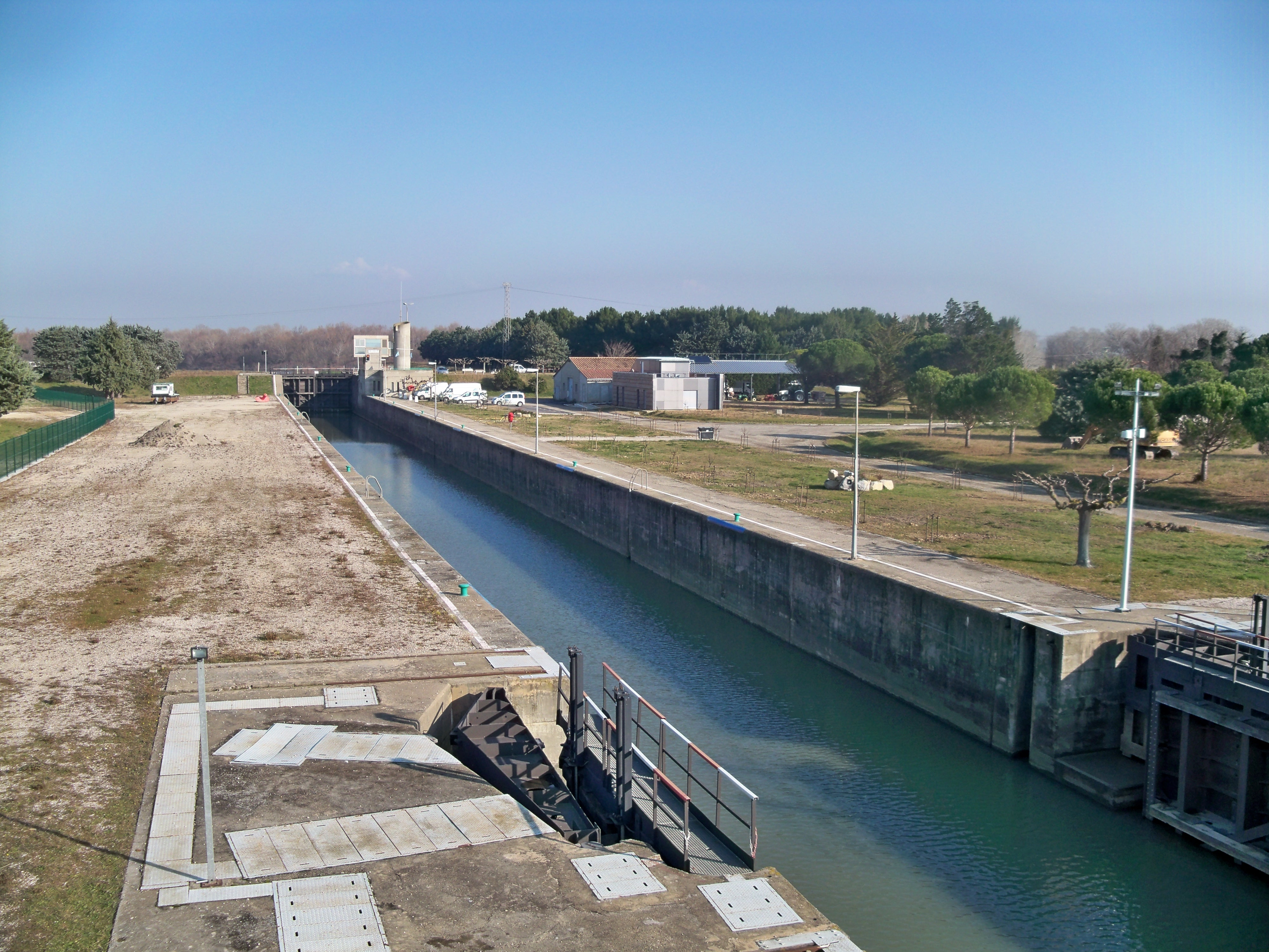 écluse de Saint Gilles (30) sur le canal du Rhône à Sète